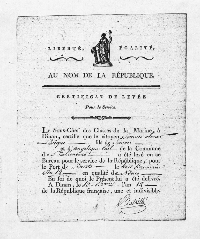 Certificat de levée : attestation donnée à Dinan en brumaire an XII à un marin de son entrée en service au port de Brest, afin de lui servir de passeport ou de justificatif. hauteur document : 19,5 cm. Vignette : 3,5 cm.